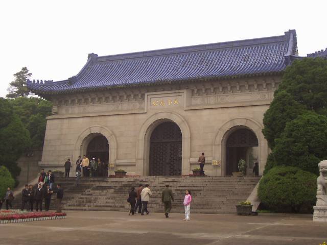 中山陵 陵門 2004年5月1日撮影 撮影者：権作 公表元URL：